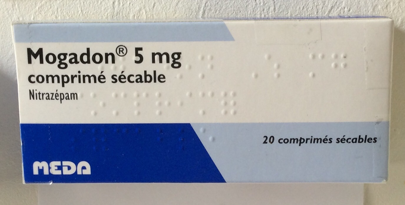 boite de Mogadon 5 mg (nitrazépam)